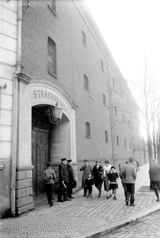 Das Zuchthaus Brandenburg a/Havel wird verlegt! Das Zuchthaus Brandenburg a/Havel , welches dem modernen Zeitalter nicht mehr genügt, soll aus dem Innern der Stadt nach ausserhalb verlegt werden. Unser Bild zeigt einen Blick au die riesigen Mauern des Zuchthauses.